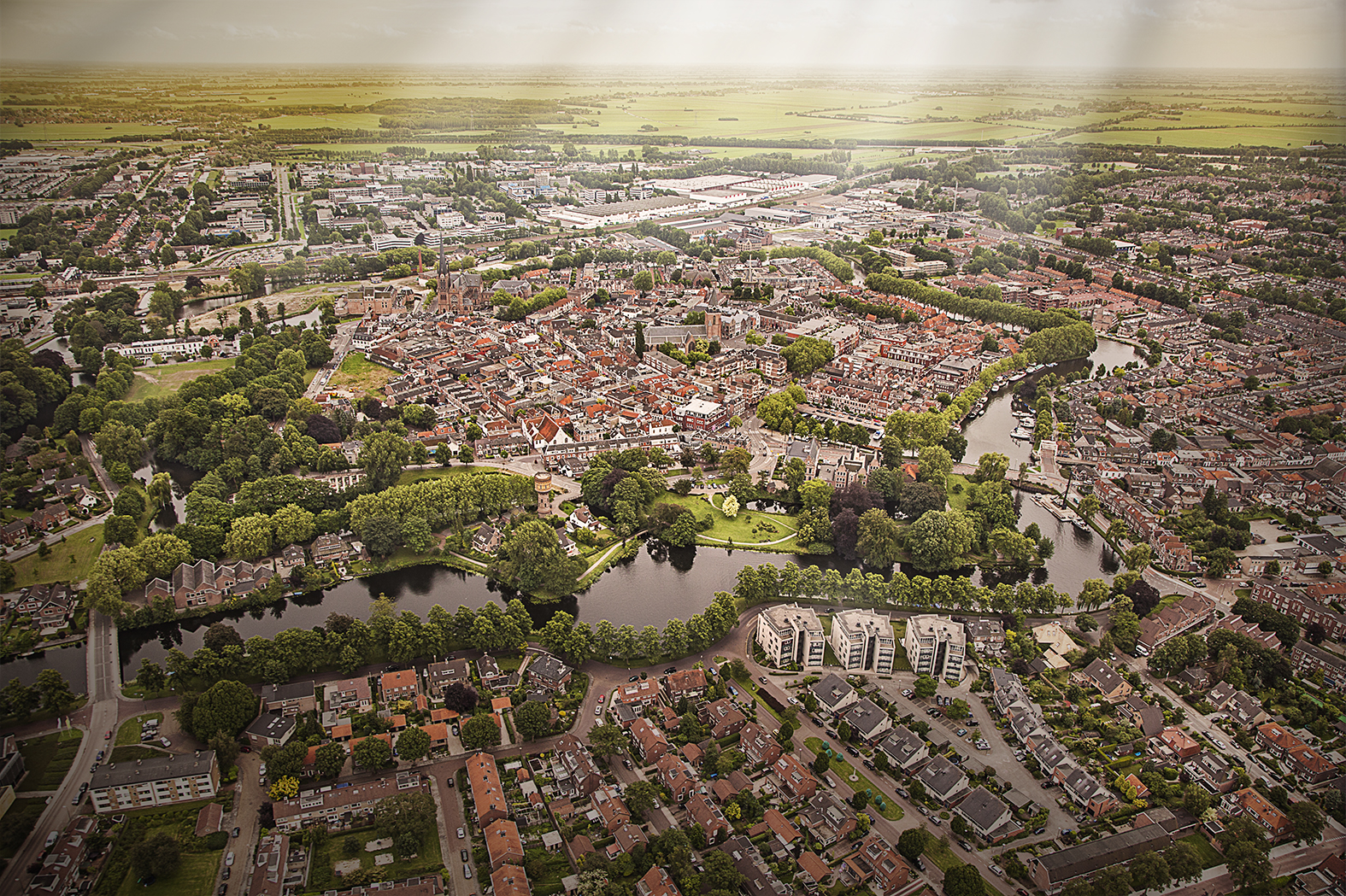 Luchtfoto Centrum Woerden 2013